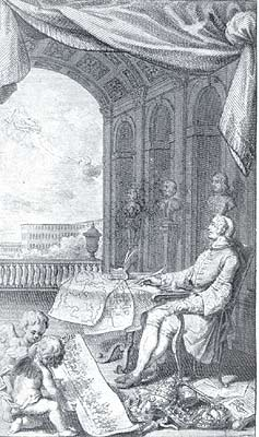 Carl Ludwig von Poellnitz (1692 -1775) Bildquelle: Friedrich von Oppeln-Bronikowsi: Abenteurer am Preußischen Hofe 1700-1800: Berlin und Leipzig: Patel, 1927.